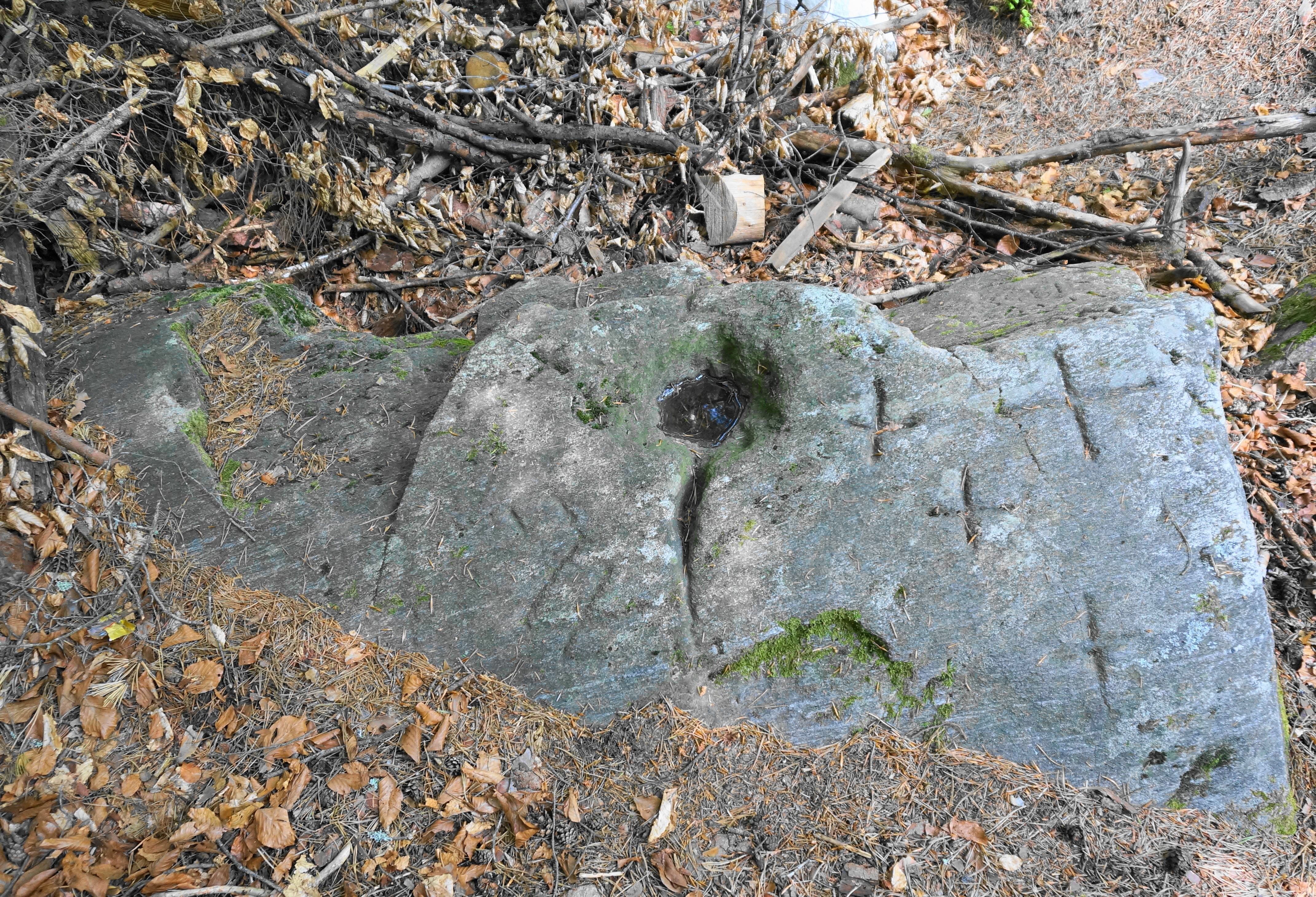 Bereits 1533 wurde der Stein mit den eingemeißelten Kreuzen (daher kommt auch sein Name) als Grenzpunkt zwischen der Grafschaft Ortenburg und dem Stift Millstatt erwähnt. Der Kreuzstein ist ein Teil des Systemes von Grenzsteinen am Fratresberg im Gebiet des Egelsees in Spittal an der Drau